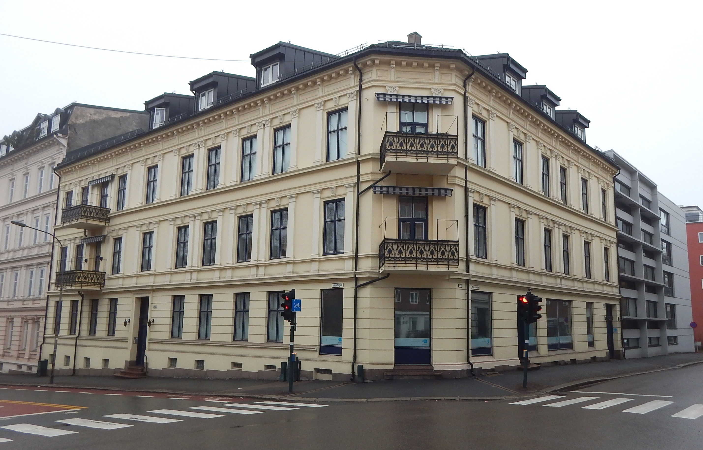 Industrigata 28. Arkitekt: Rudolf Haeselich.